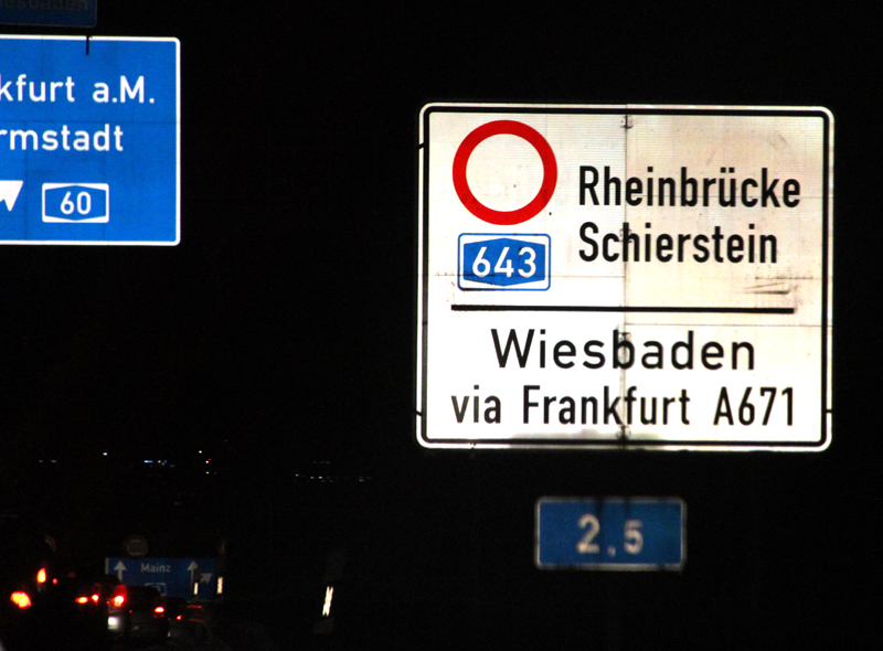 Klappschild an der Bundesautobahn 63 kurz vor dem Autobahnkreuz Mainz-Süd Fahrtrichtung Mainz. Hinweis auf die Sperrung der Schiersteiner Brücke und Umleitungshinweis. Die Tafel steht bereits seit mindestens 2006 an der Stelle.